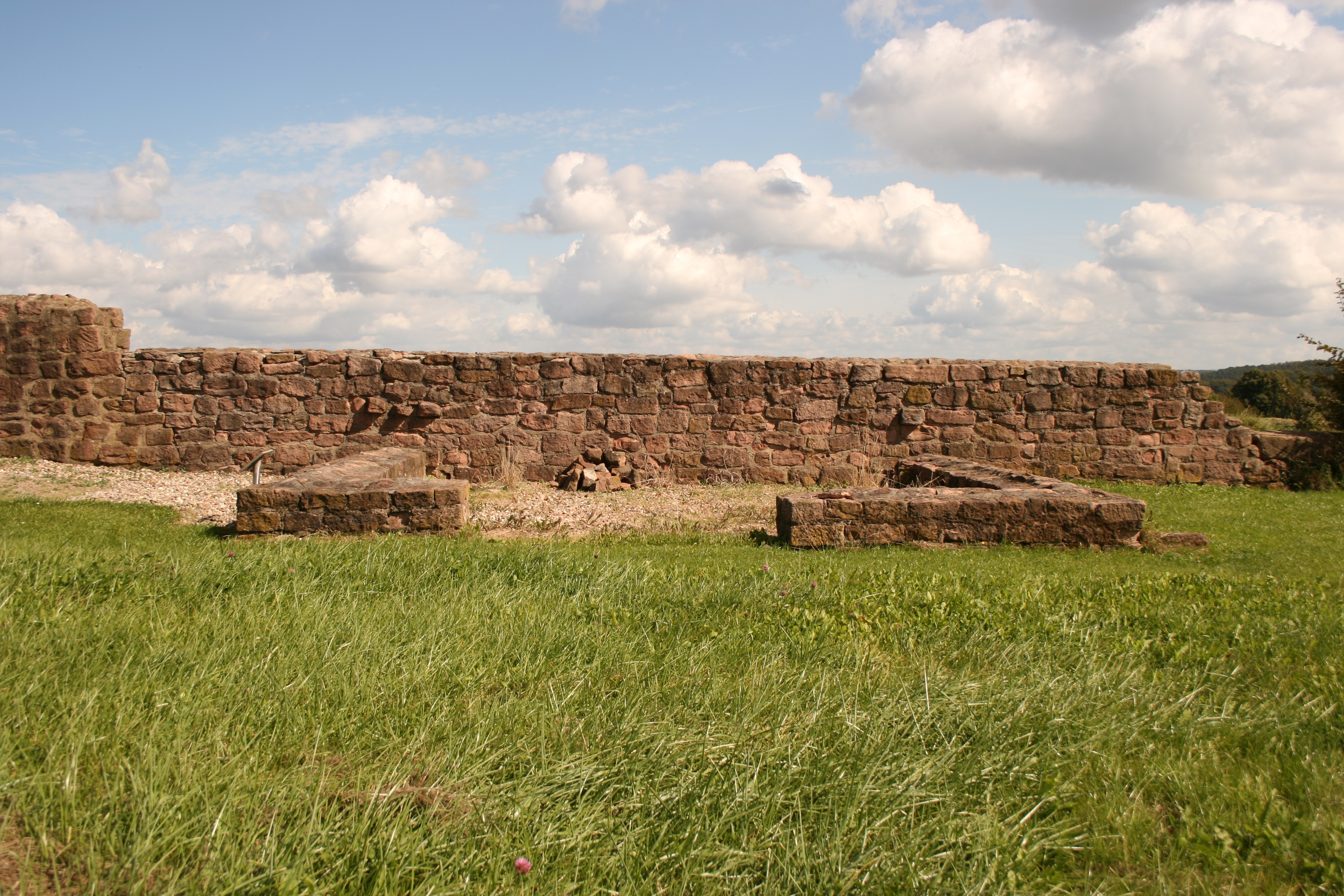 Nebengebäude der Villa rustica "Haselburg", an die östliche Hofmauer angelehnt.